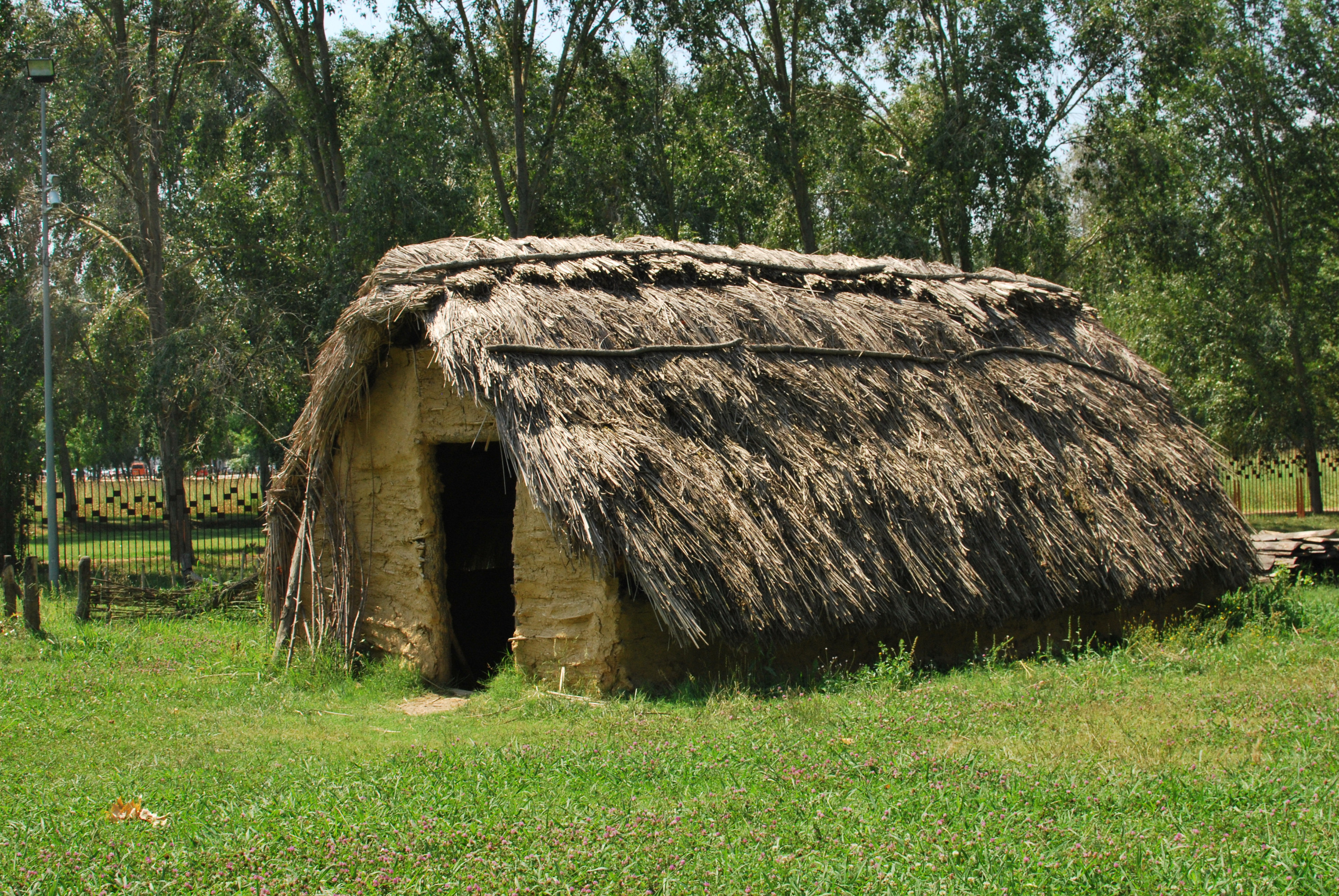 Una de les cabanes reconstruïdes mitjançant mètodes d'arqueologia experimental, al mateix parc arqueològic.